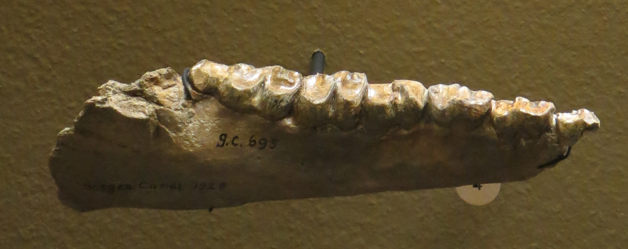 Fossil of Anoplotherium - Took the picture at Natural History Museum, Basel